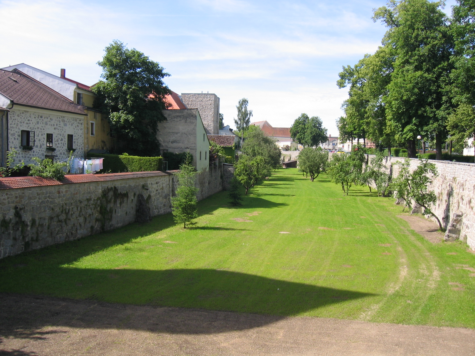 ehemaliger Wassergraben zwischen Scheiblingturm und Brauhaus (mit restauriertem Turm des Salzhofs)